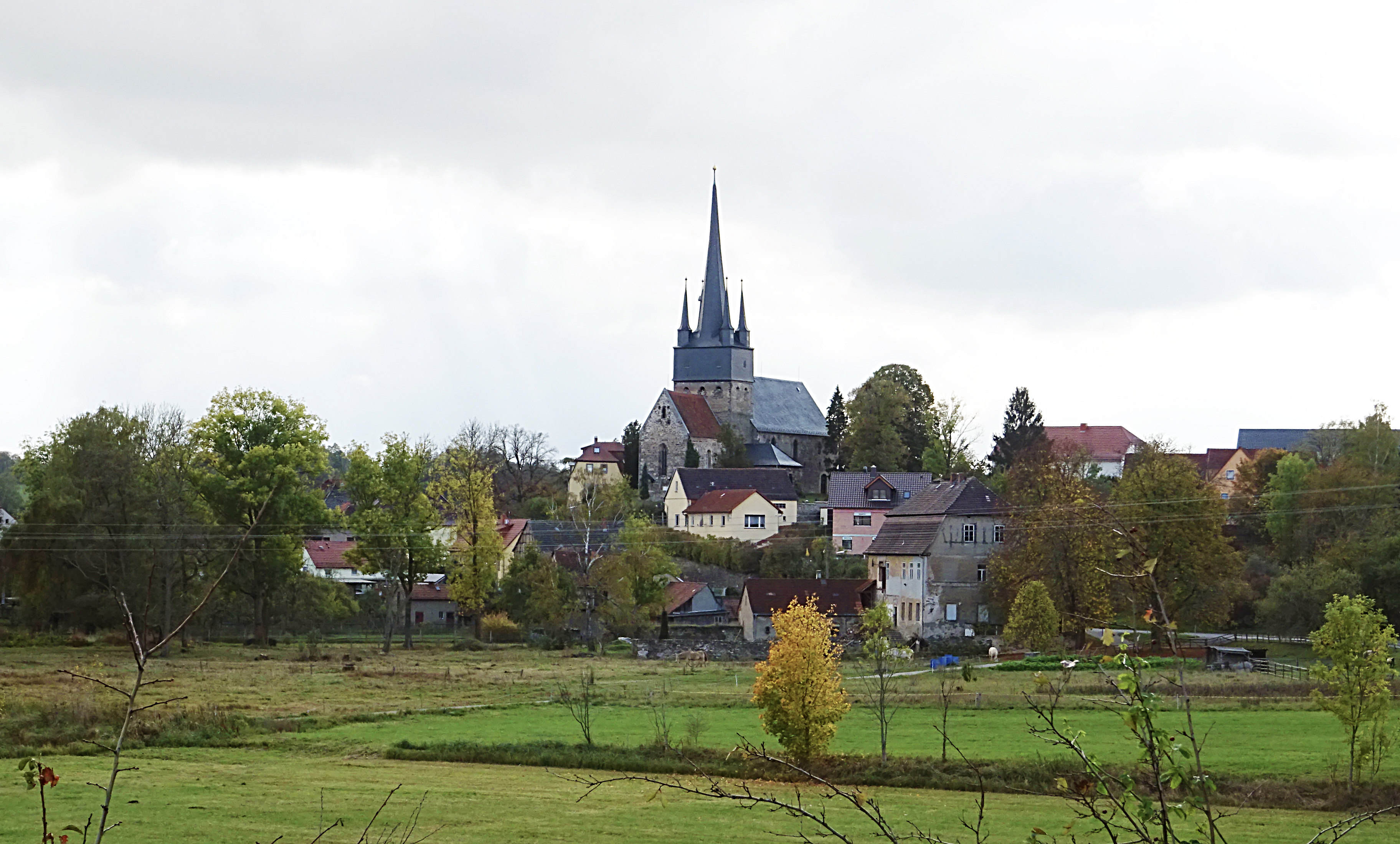 Kirche St. Simon und Juda (Neunhofen) Auf dem Dohlenberg